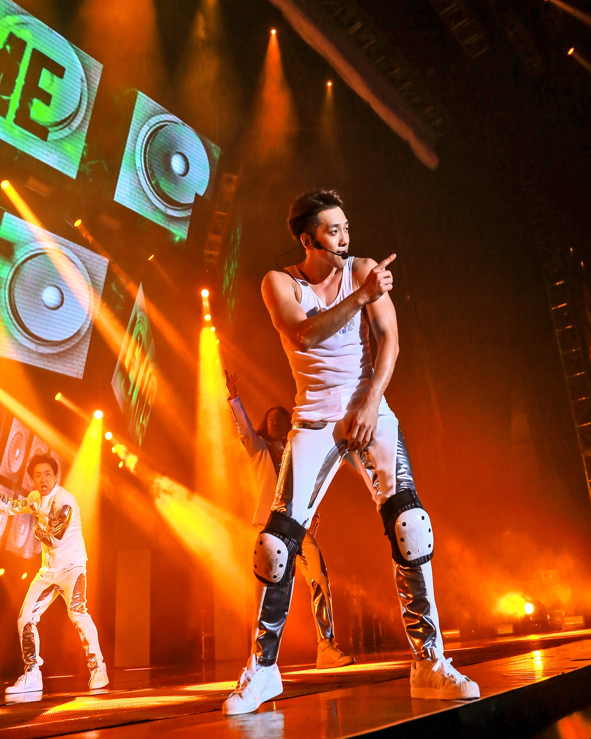 2015 rain王者回归深圳站演唱会